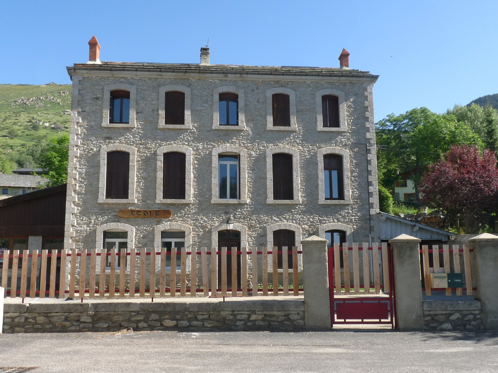 Ecole de Targassonne, Pyrénées-Orientales, France